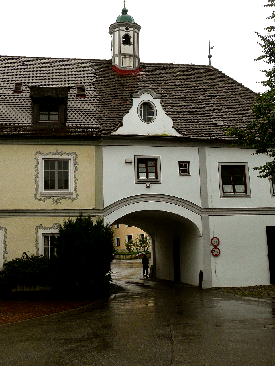 Entrée du cloître de Gutenzell, district de Biberach, Wuertemberg.